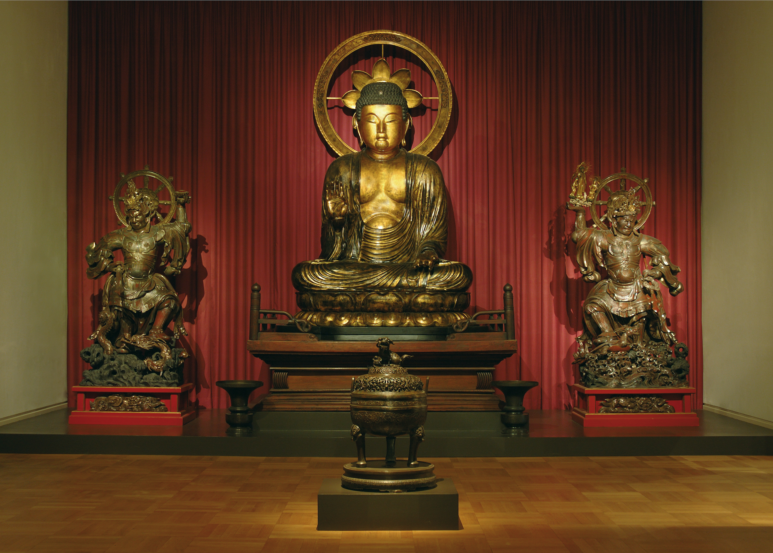 Blick in den Buddha-Saal des Münchner Völkerkundemuseums